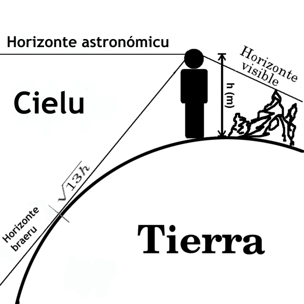 horizontes